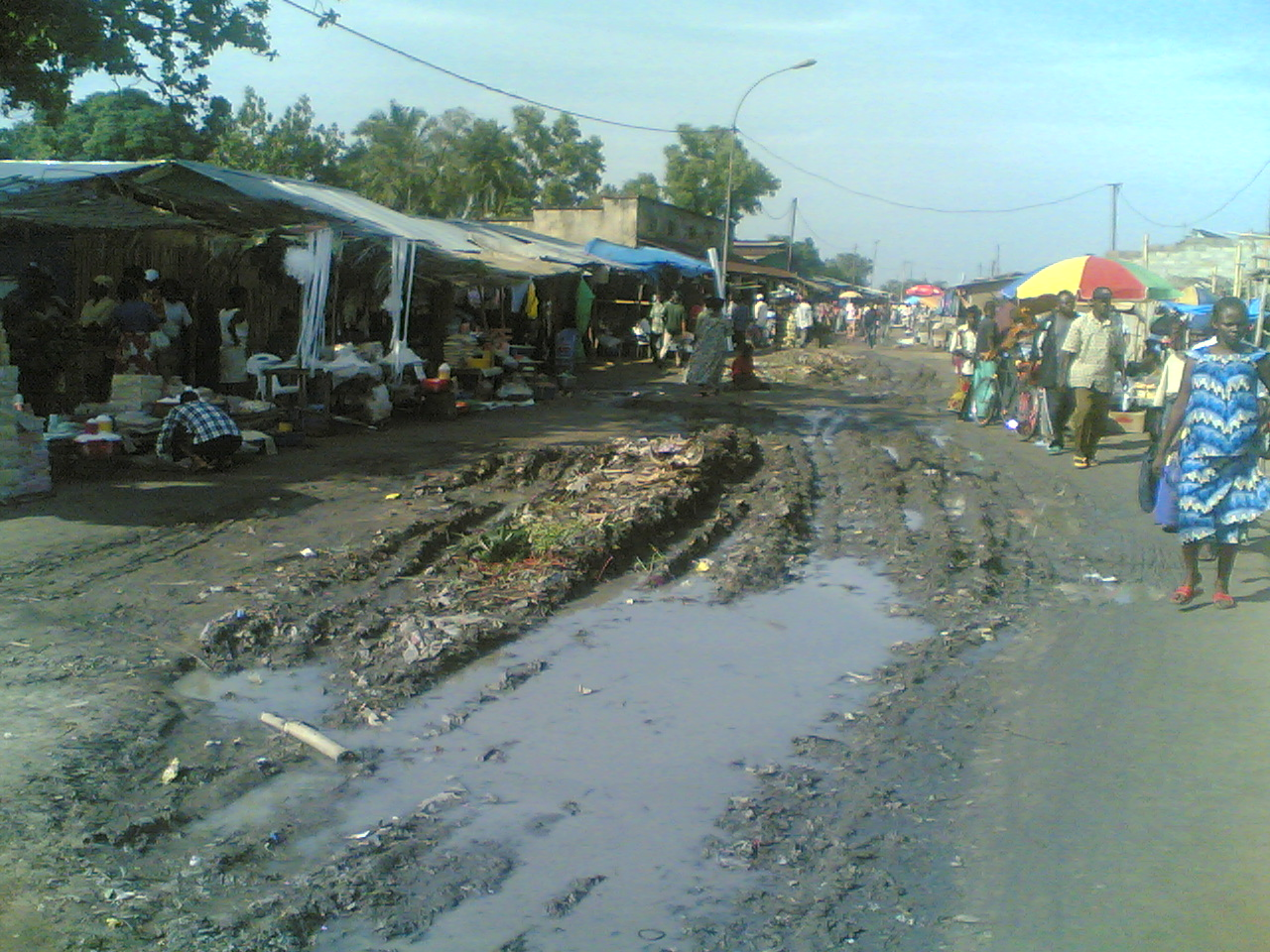 Market in Bandundu, DRC